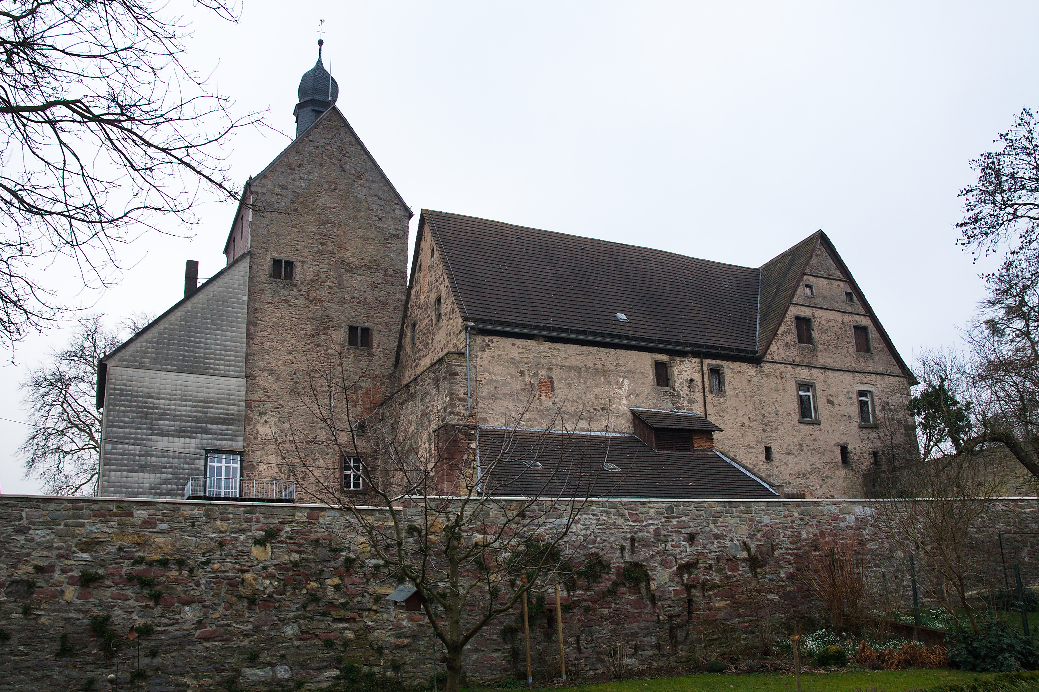 Ehemalige Wasserburg, heute Domäne in Grohnde (Emmerthal), Niedersachsen, Deutschland